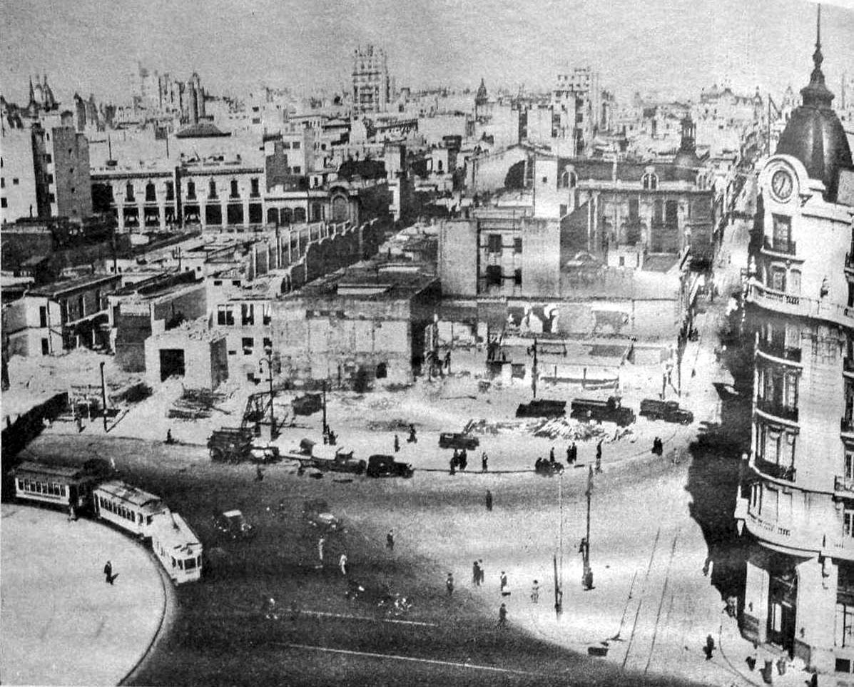 Demoliciones en las cuadras marcadas por las calles Carlos Pellegrini y Cerrito, para la apertura de la Avenida 9 de Julio. Vista tomada desde el cruce con la Avenida Corrientes, mirando hacia el sur. A la derecha, la cúpula del Nuevo Banco Italiano, a la izquierda la rotonda del Obelisco. Buenos Aires, Argentina.